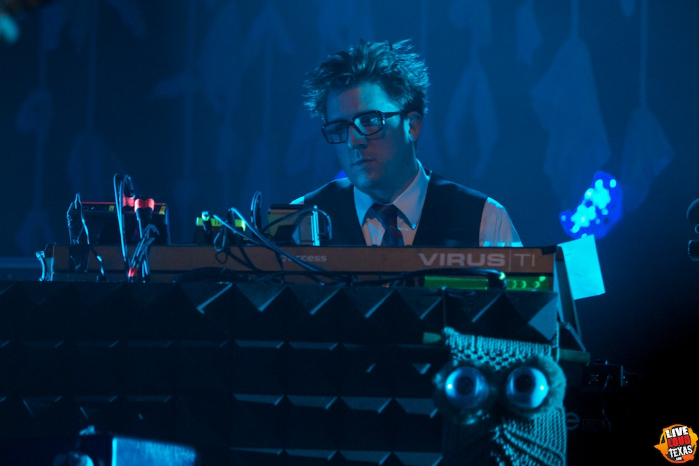 Mikael Jorgensen, el tecladista de Wilco, en 2011